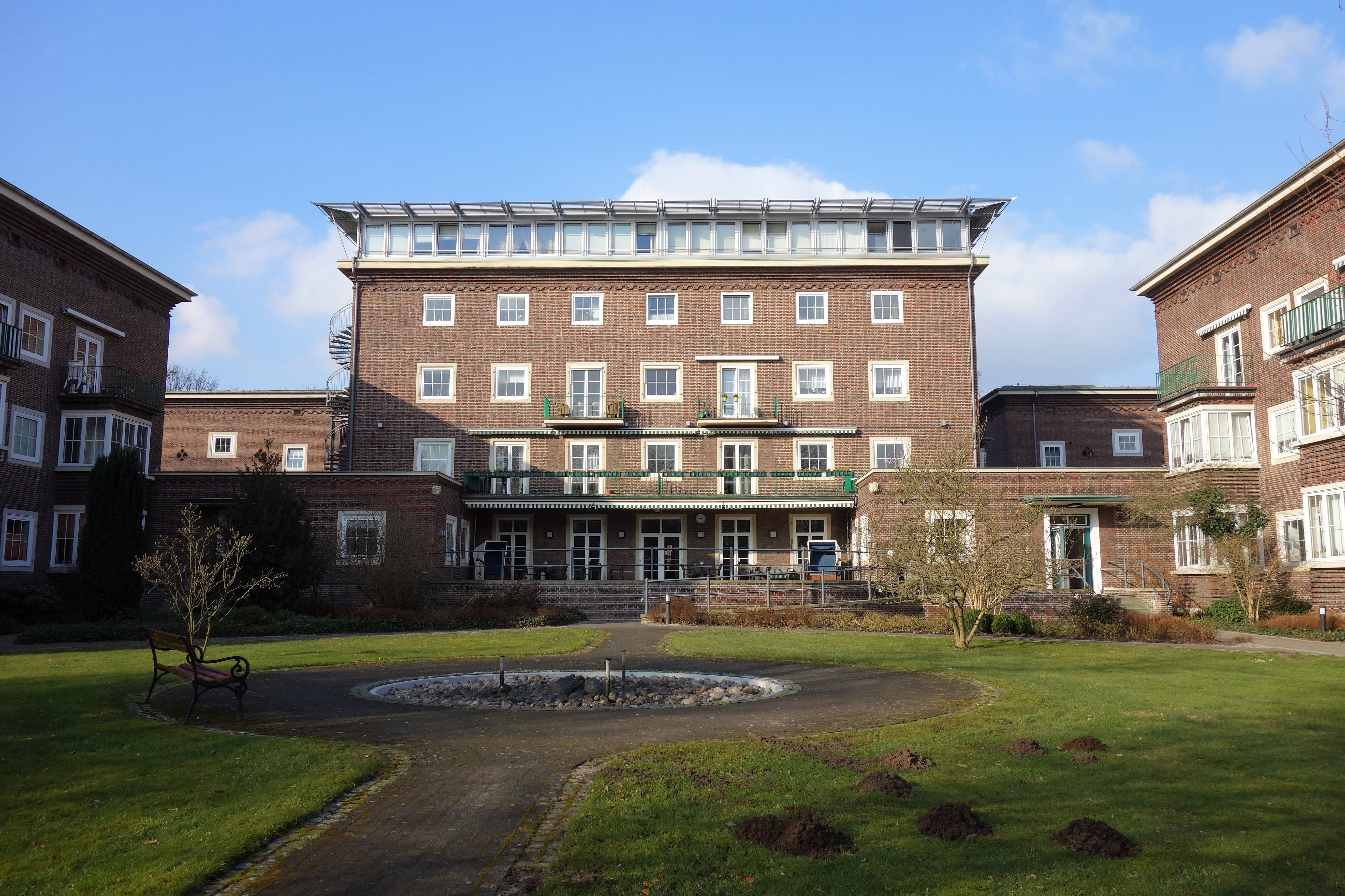 Landhaus Horn: Blick vom Vorgarten auf das zentrale Gebäude